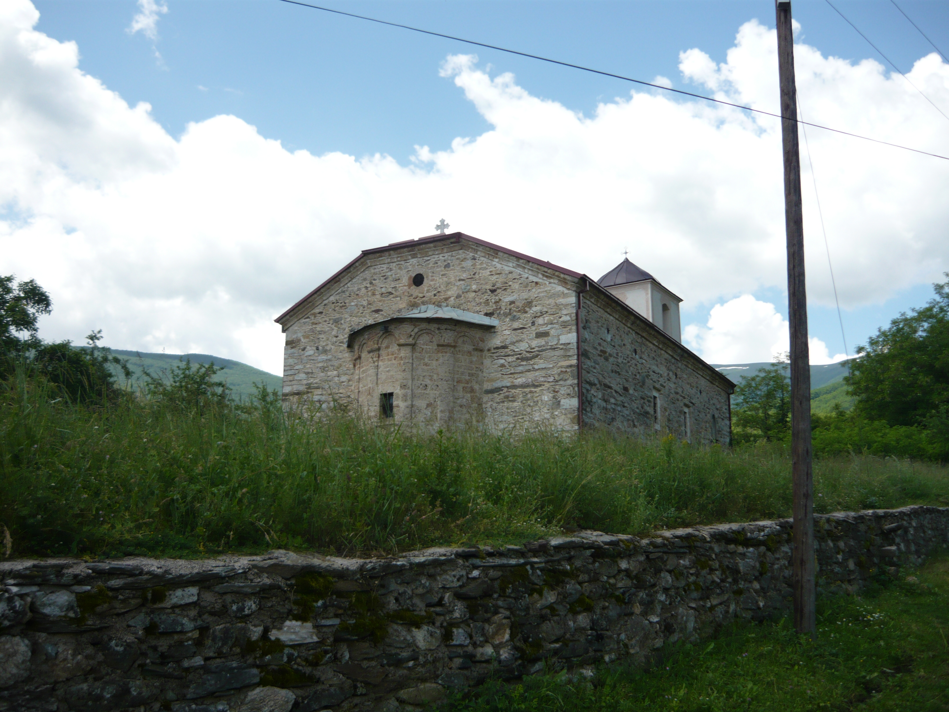 Богородица, Слоештица